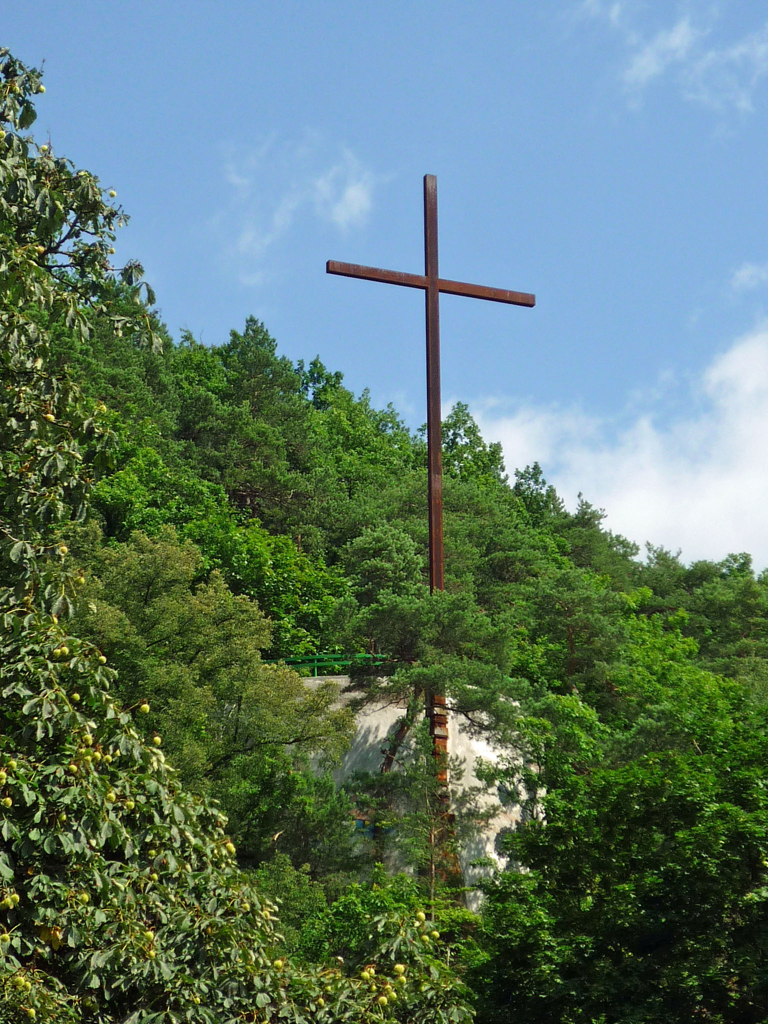 Kreuz oberhalb der Kirchstraße in Freital-Hainsberg